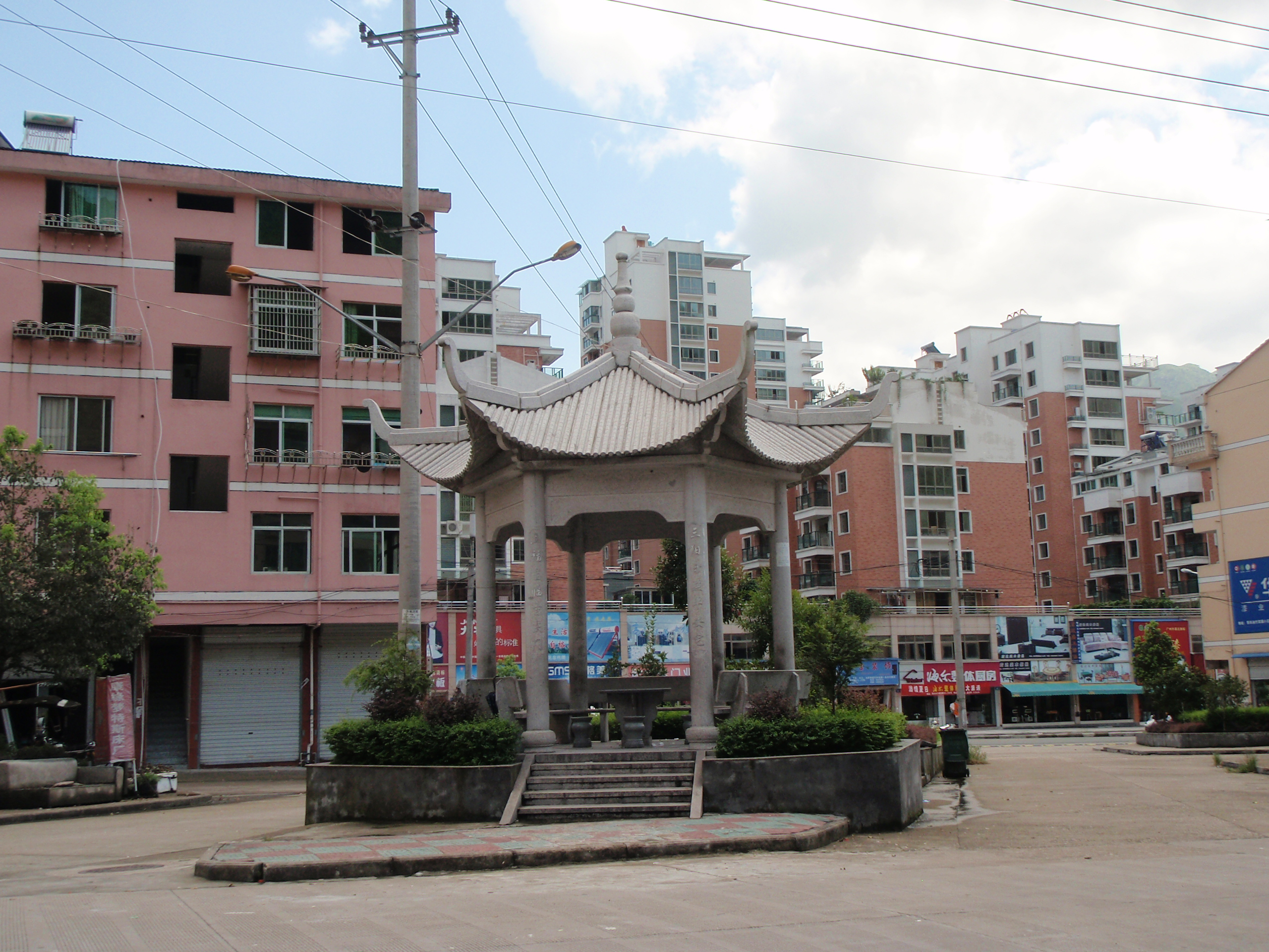 油竹新村